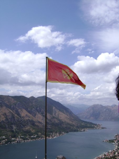 Kotor,Montenegro